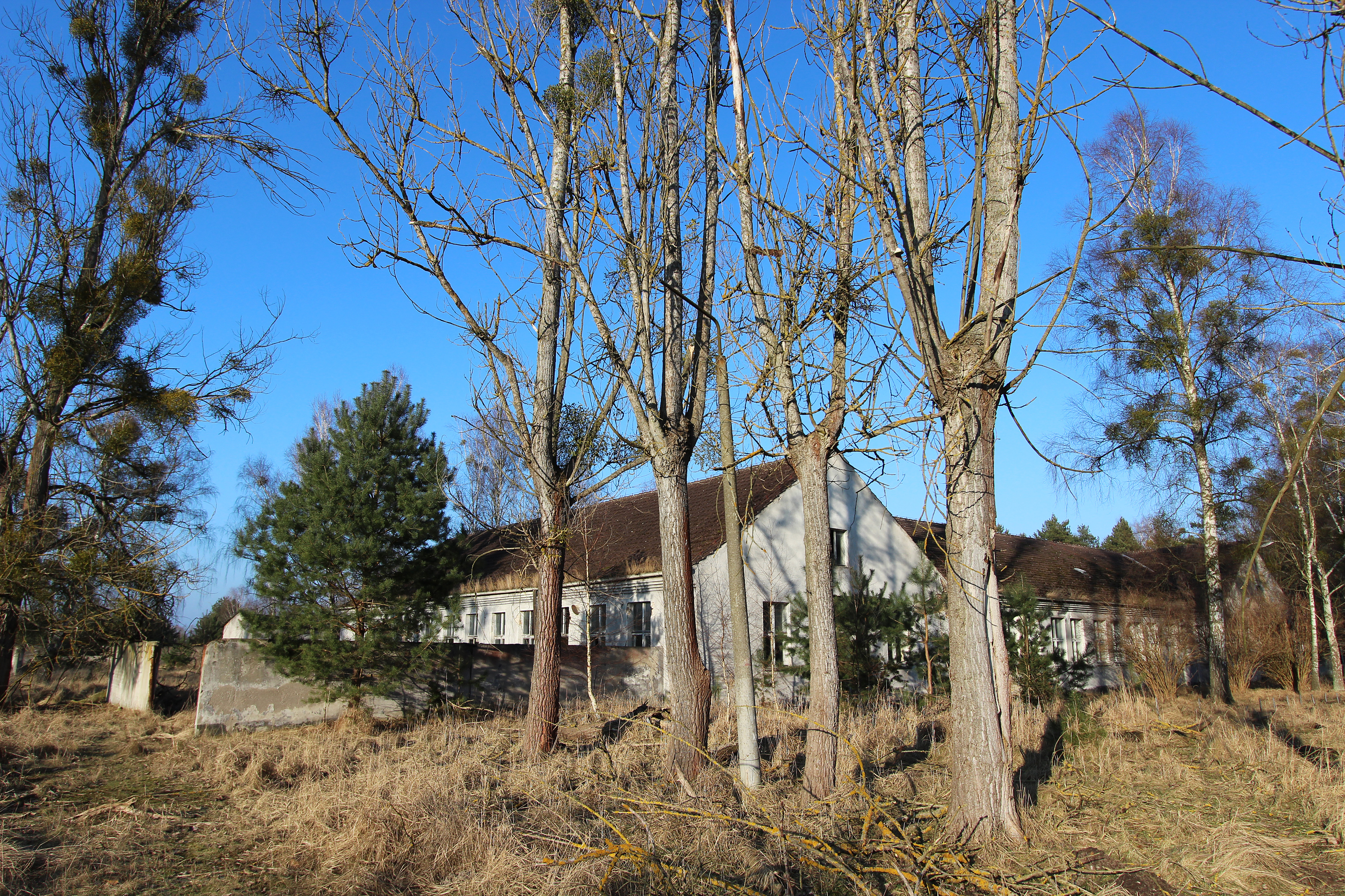 Ehemaliges GSSD-Gelände in Vogelsang, 2015